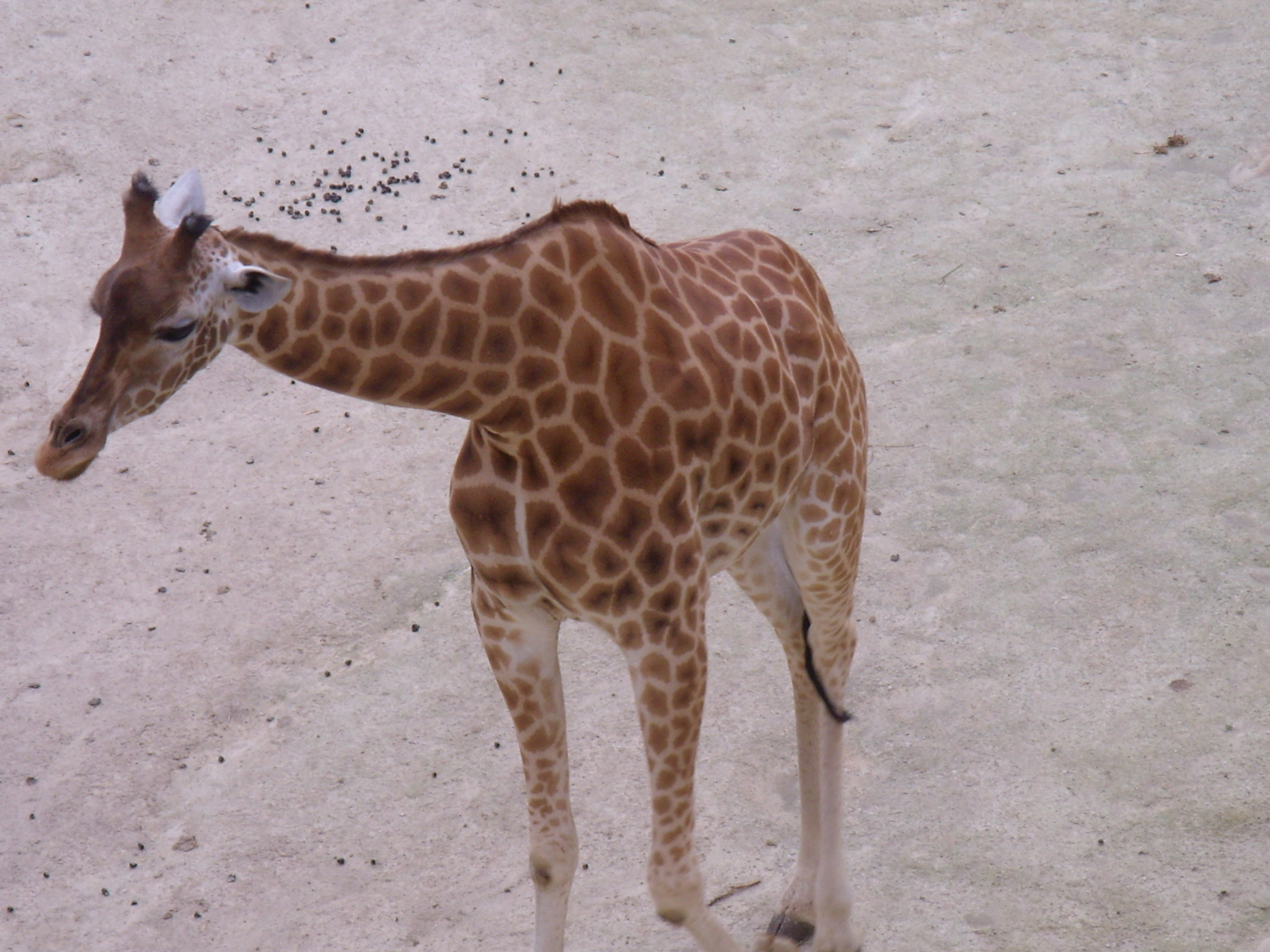 une girafe d'Afrique de l'ouest au bioparc zoo de Doué-la-Fontaine